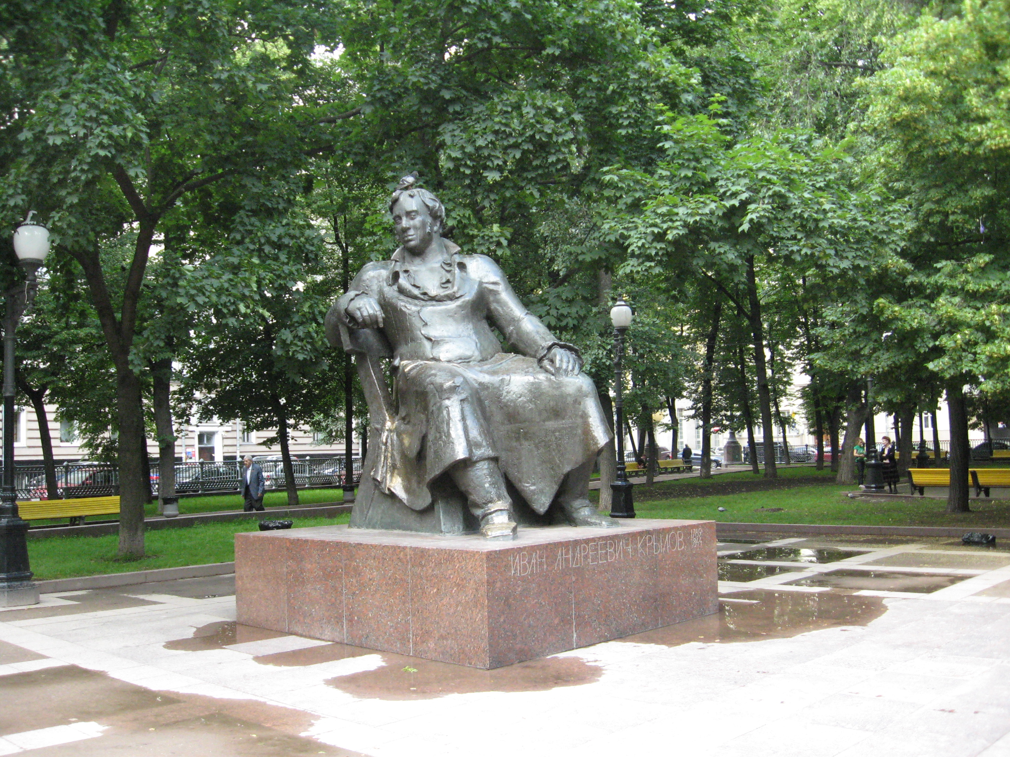 Памятник Крылову